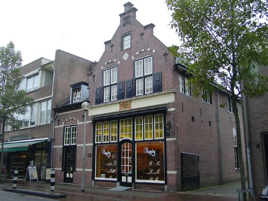 Voormalige drogisterij van Peerbooms aan de Stationsstraat te Deurne (NL).